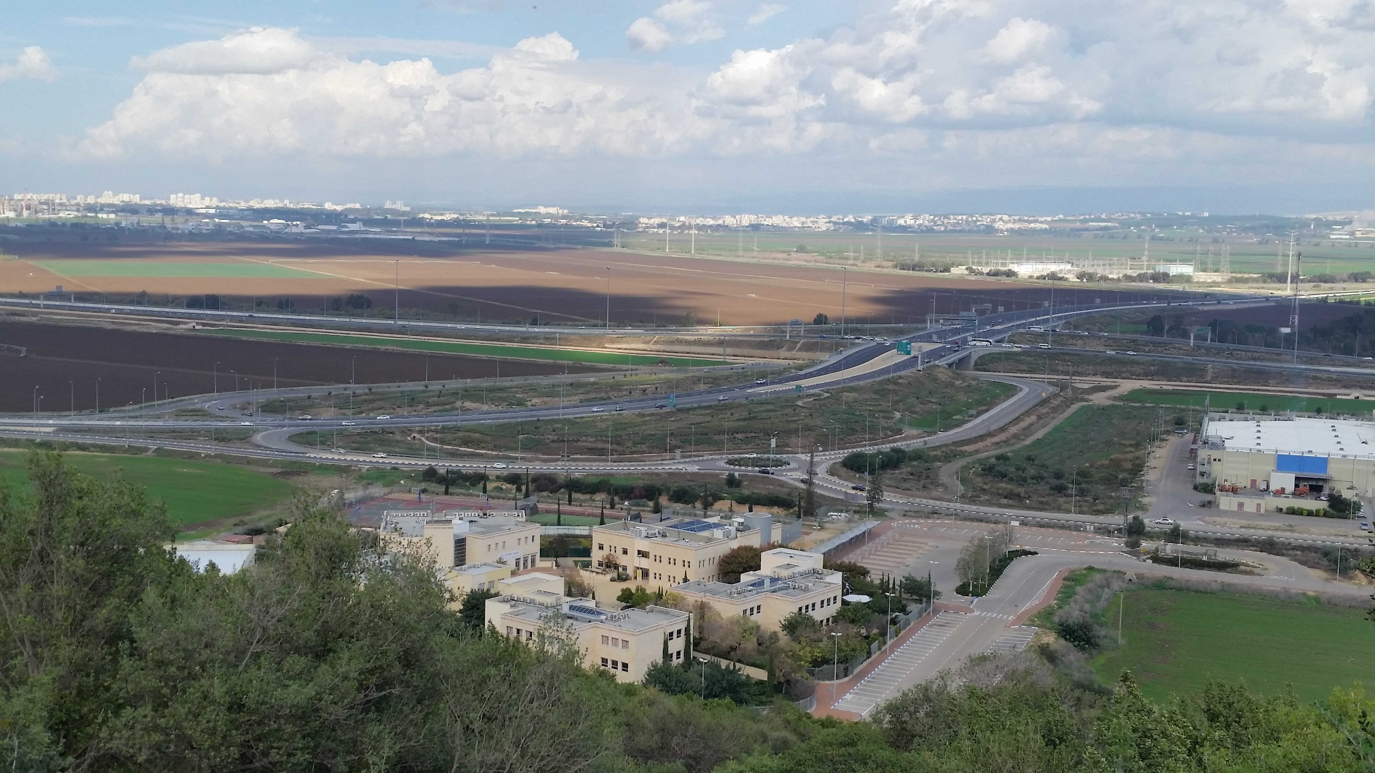 מחלף יגור מבט מהשביל הירוק המוביל מנשר ליגור